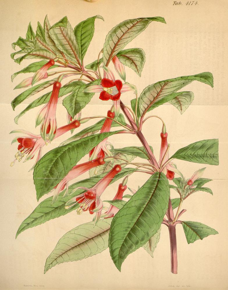 Illustration of Fuchsia denticulata (Orig. Fuchsia serratifolia)